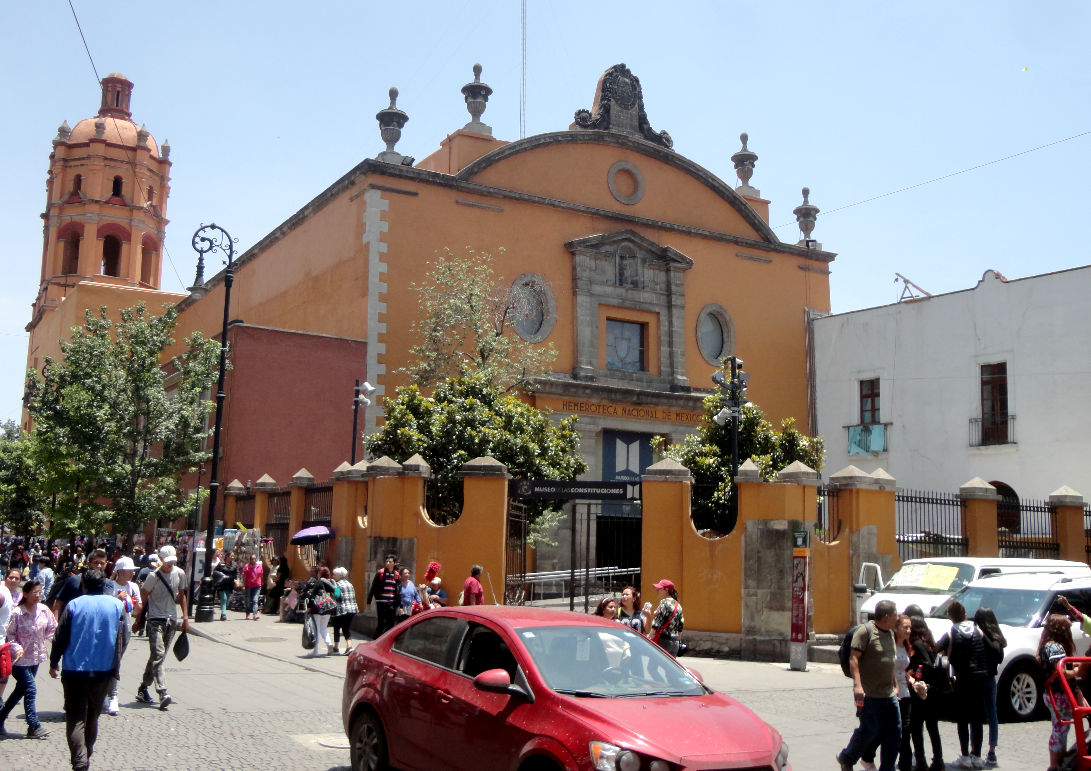 Iglesia de San Pedro y San Pablo (Museo de las Constituciones), Ciudad de México